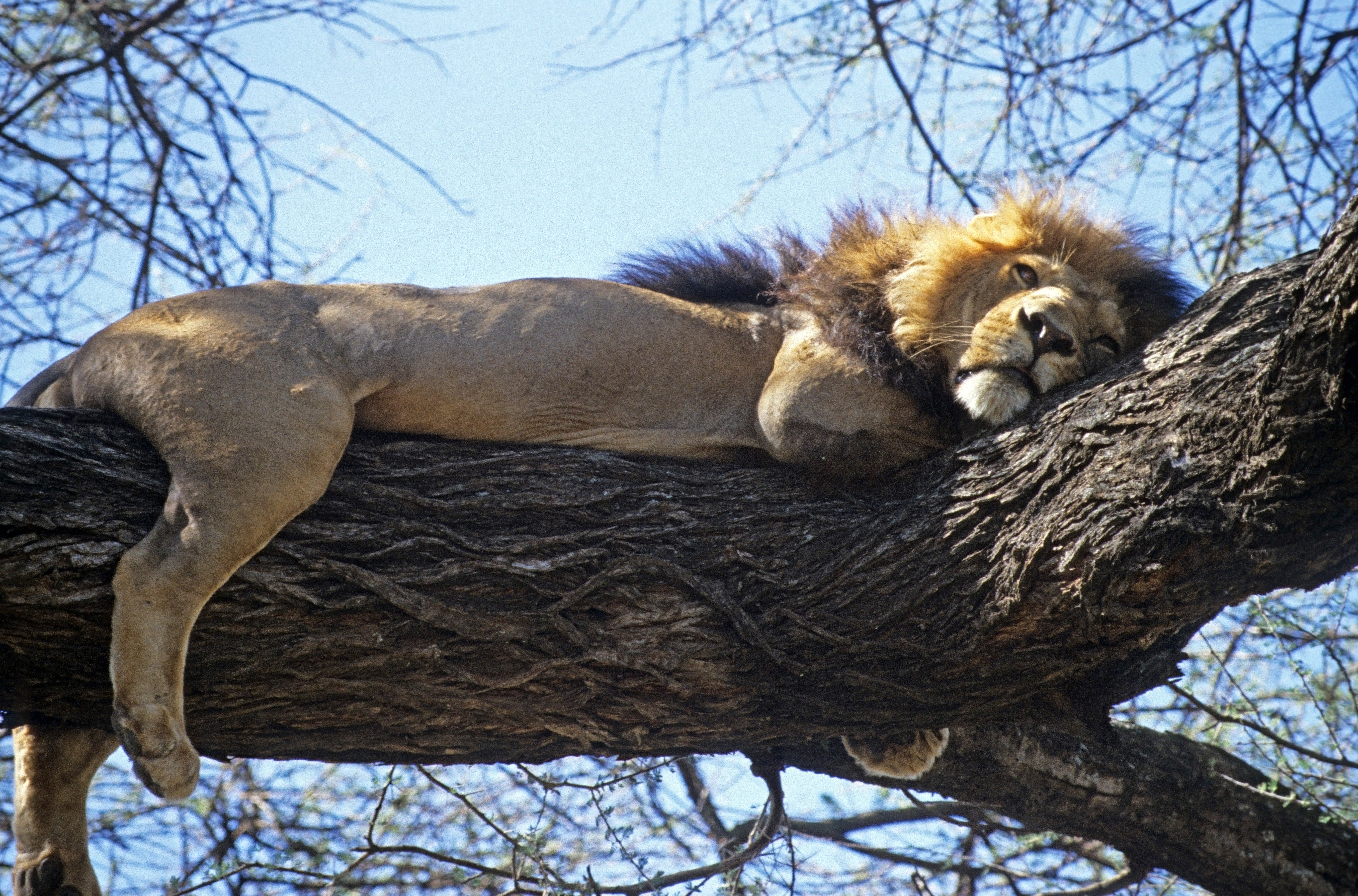 Lion on tree in Lake Manyara National Park